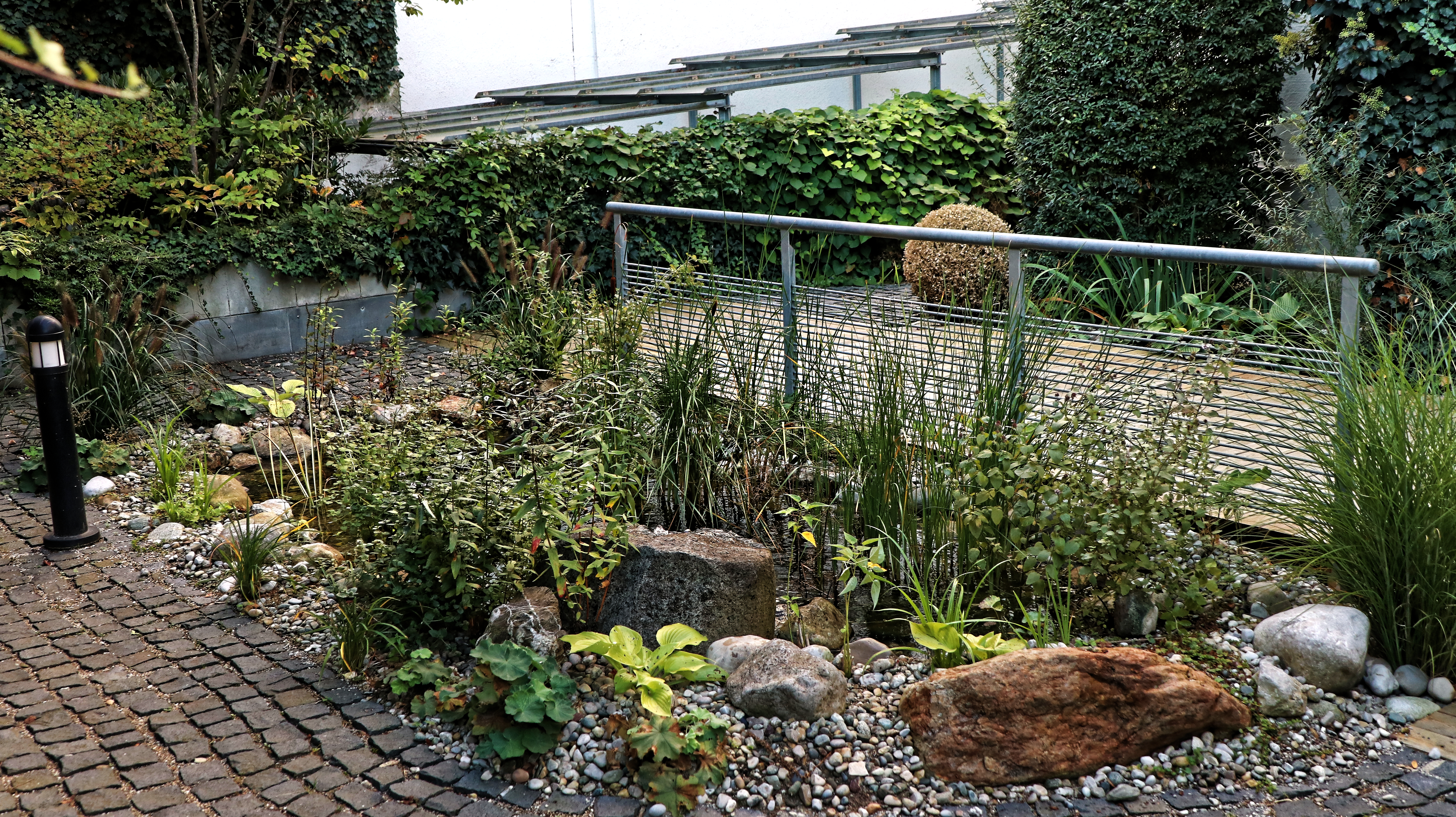 Teich im September 2018, das in die Wasserbereiche runtergetretene Stein- und Kiesmaterial ist nach oben gezogen, die Ränder stabilisiert, die offenen Folien abgedeckt